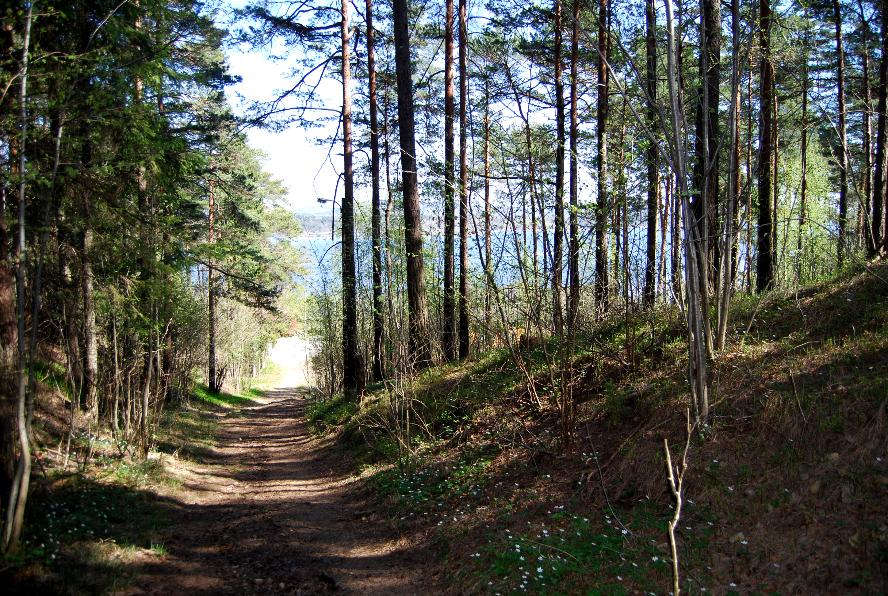 Røsskleiva naturreservat i Bamble kommune, Telemark.